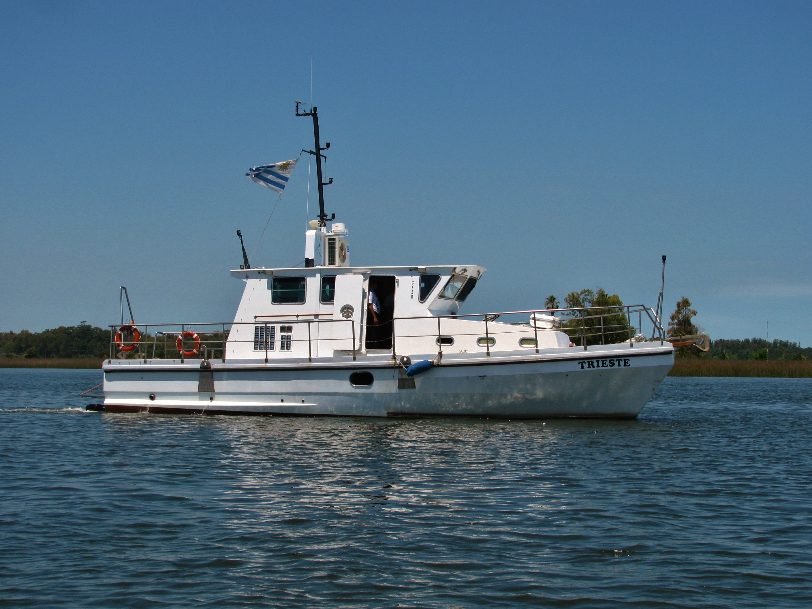 Lancha Trieste